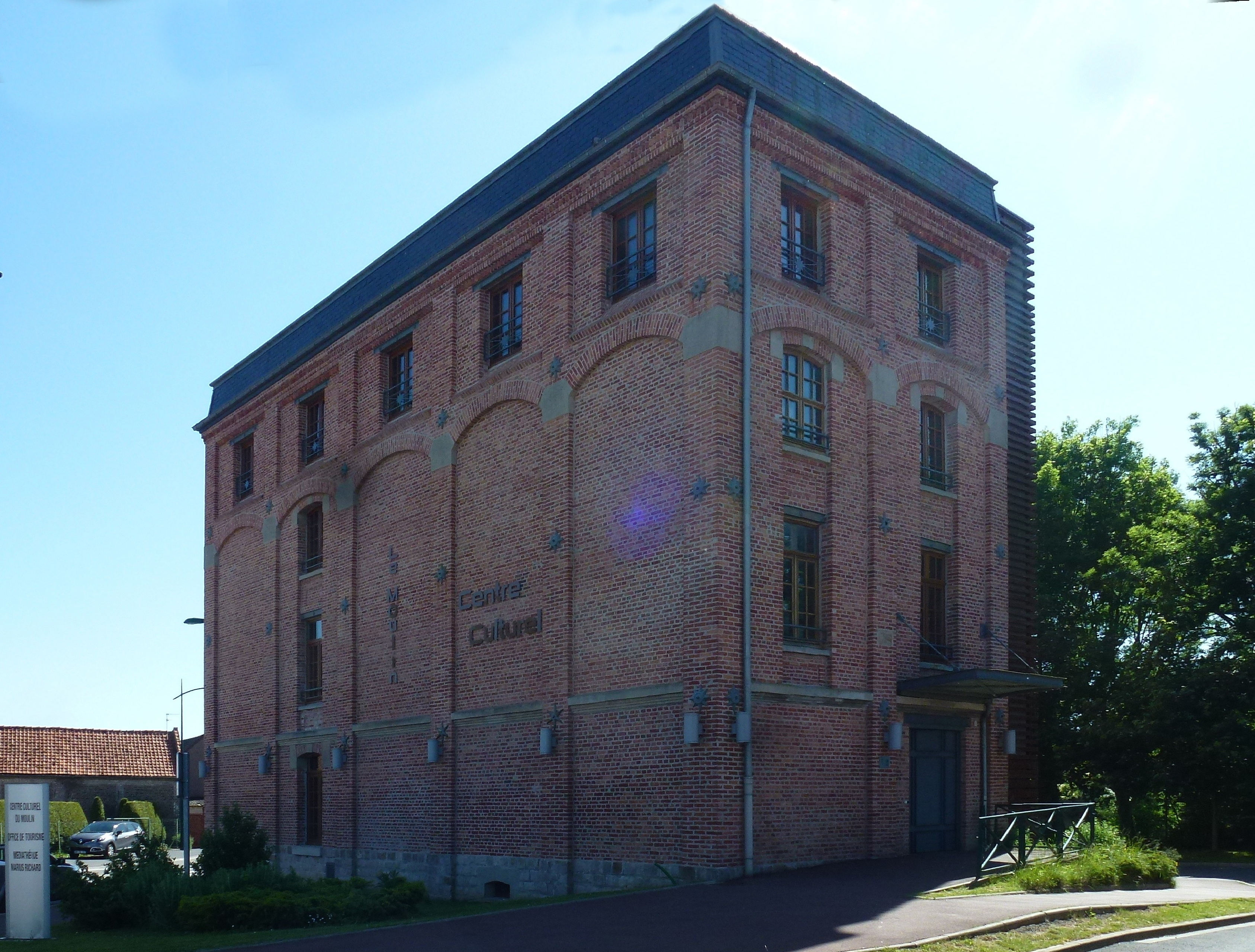 Centre culturel du moulin Arleux Nord